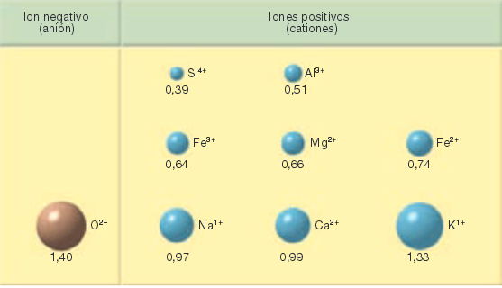 dgsgv